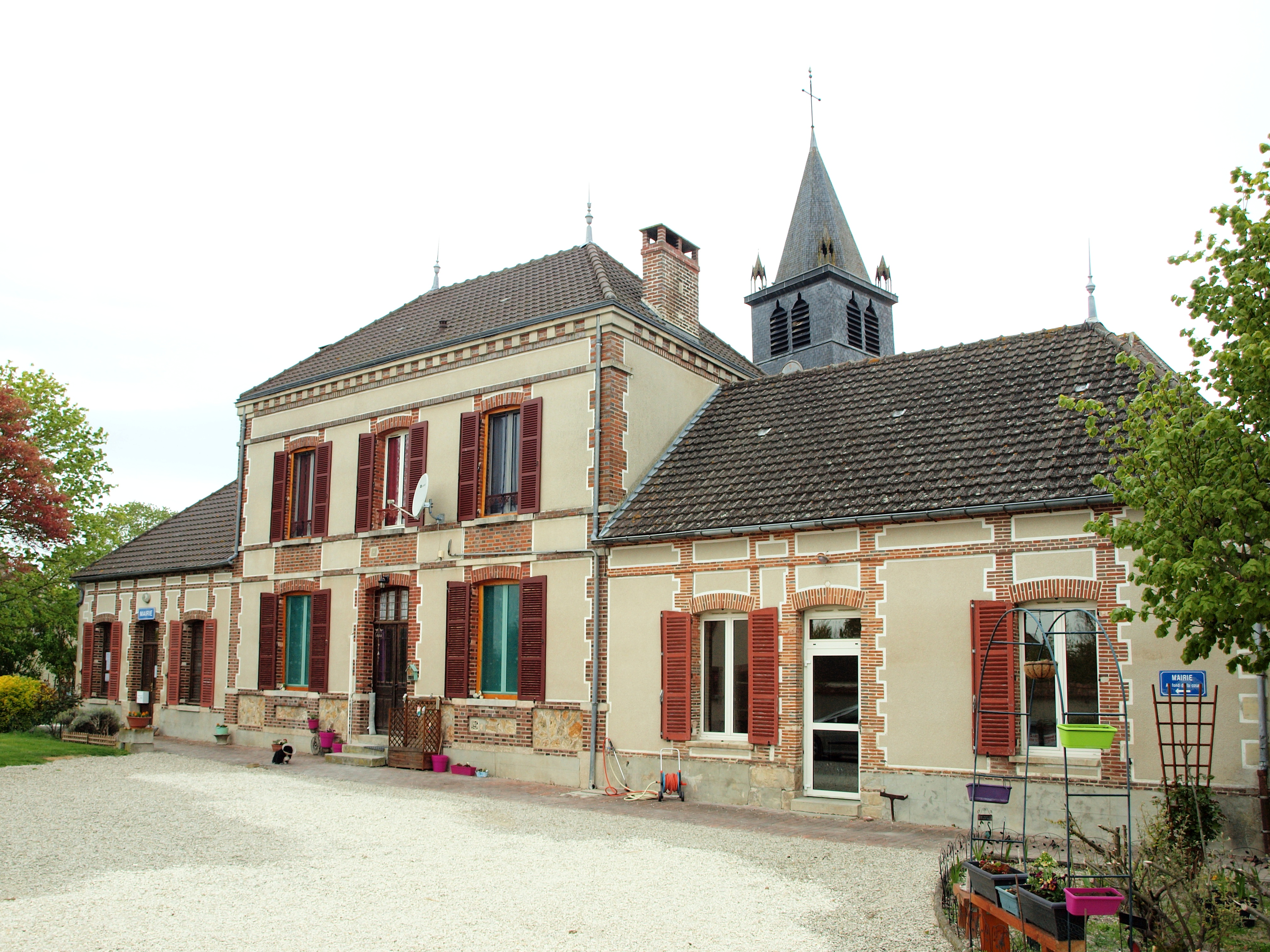 Allemanche-Launay-et-Soyer (Marne, France)